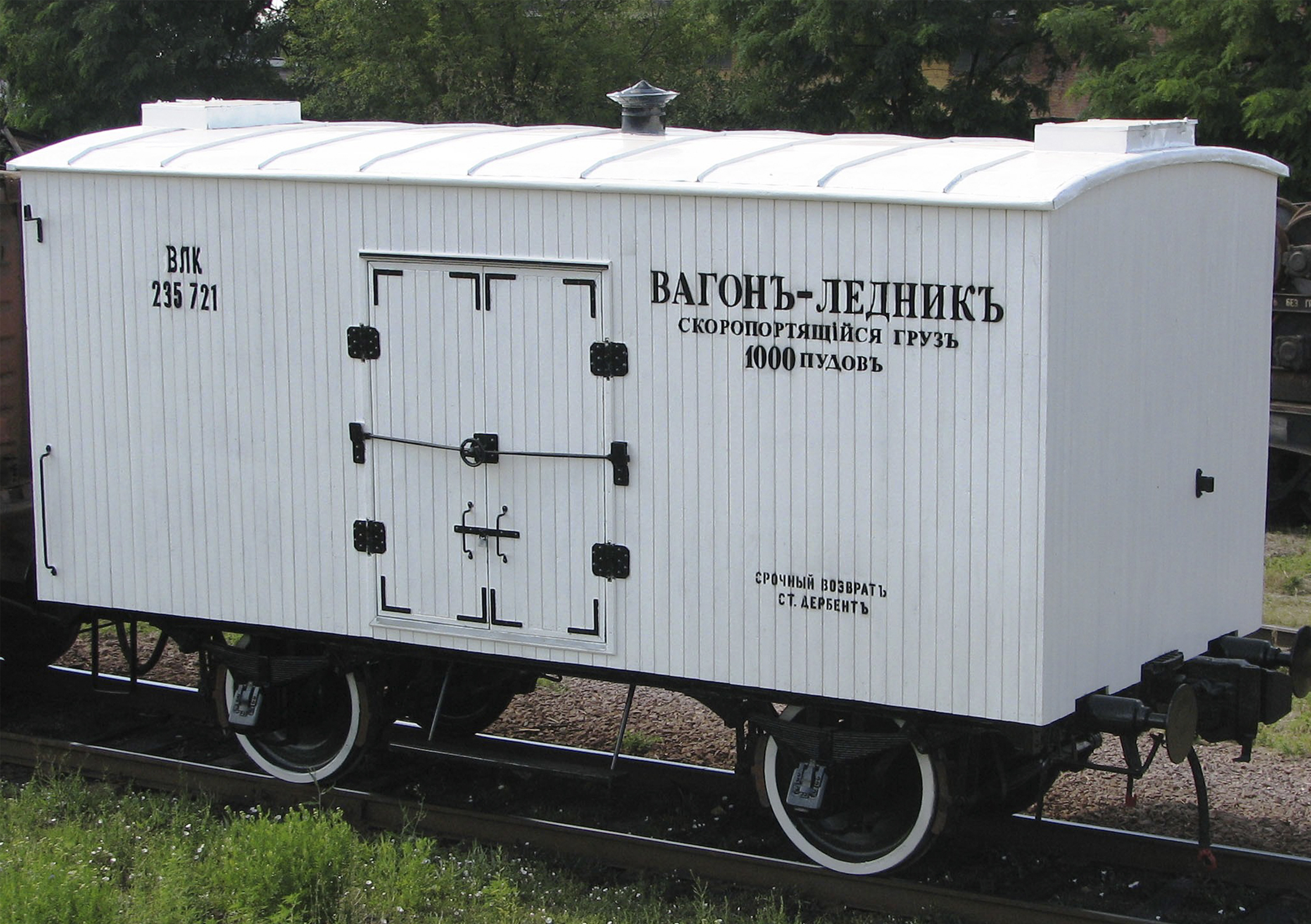 Построен в 1914 году